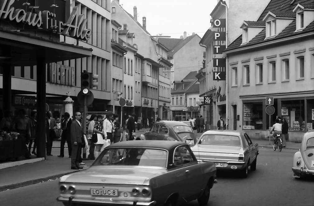 Lörracher Innenstadt: Kreuzung Turmstraße